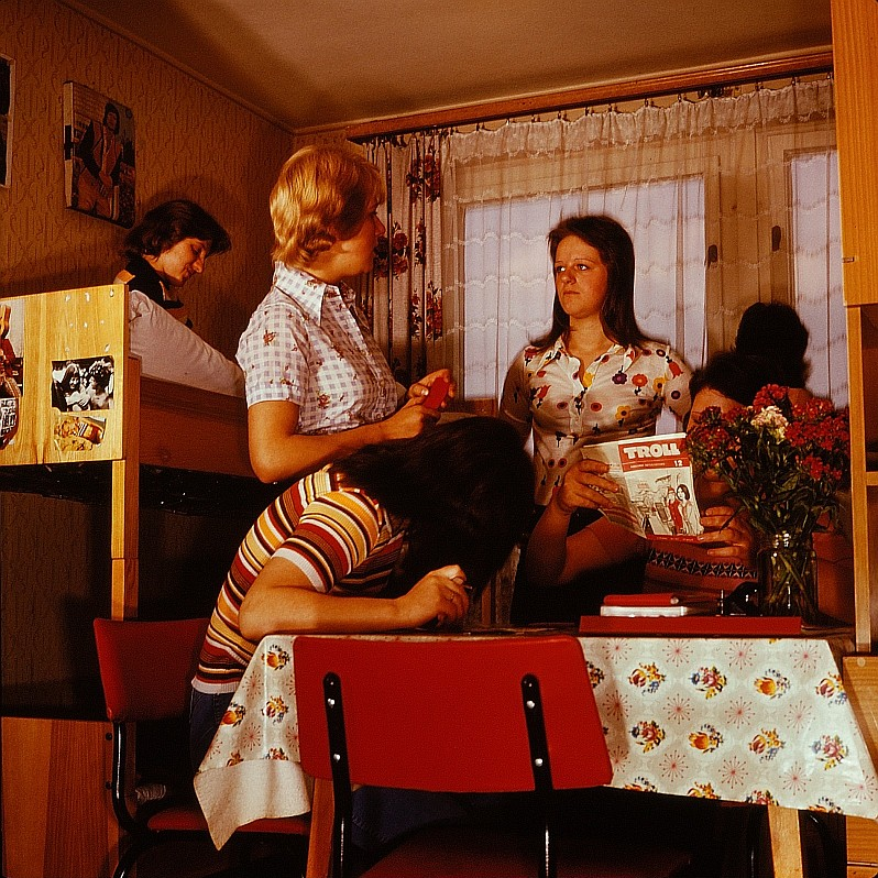 Original image description from the Deutsche FotothekWohnheim